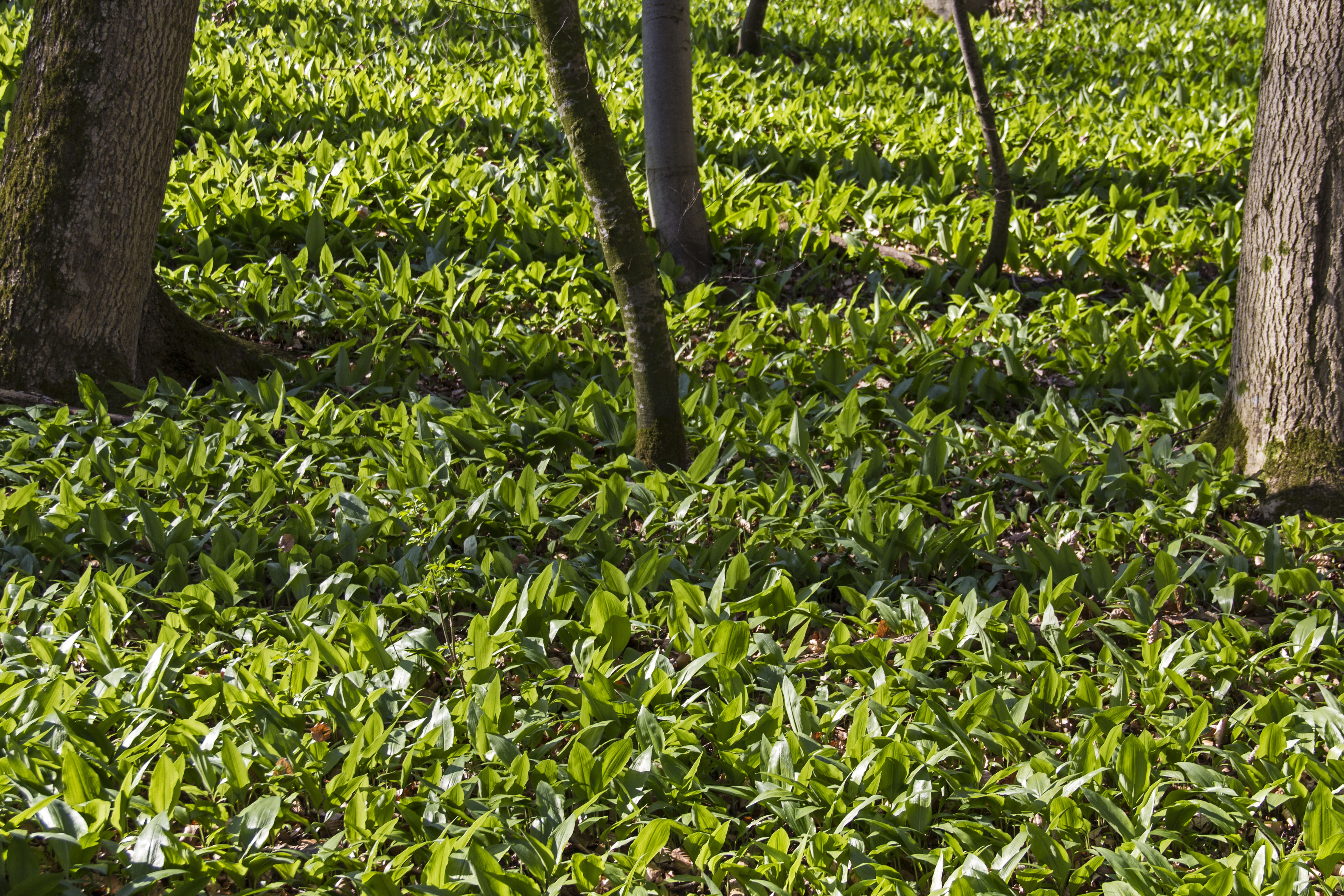 Steinerne Rinne, Wolfsbronn